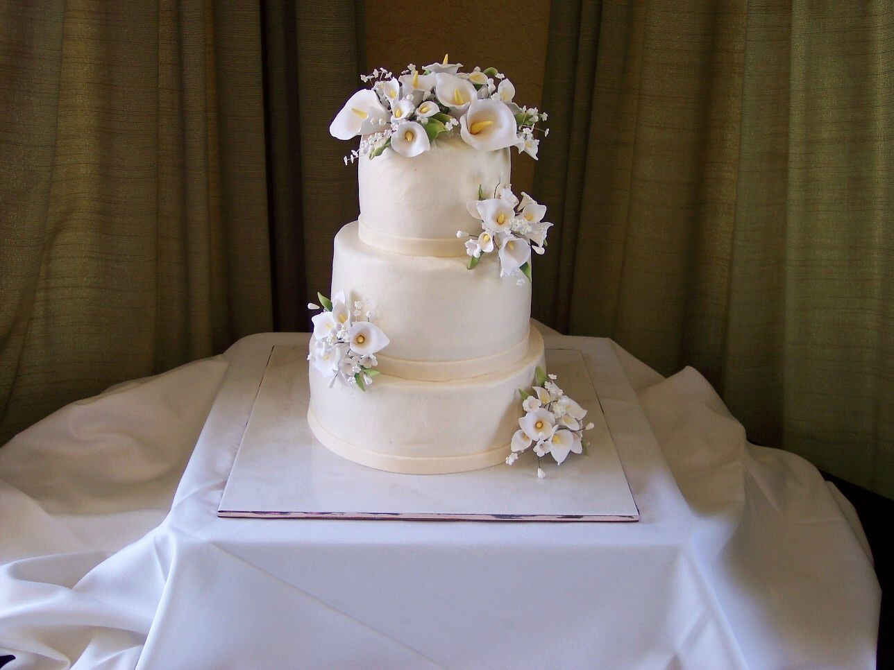 Mason Sweets Wedding Cake